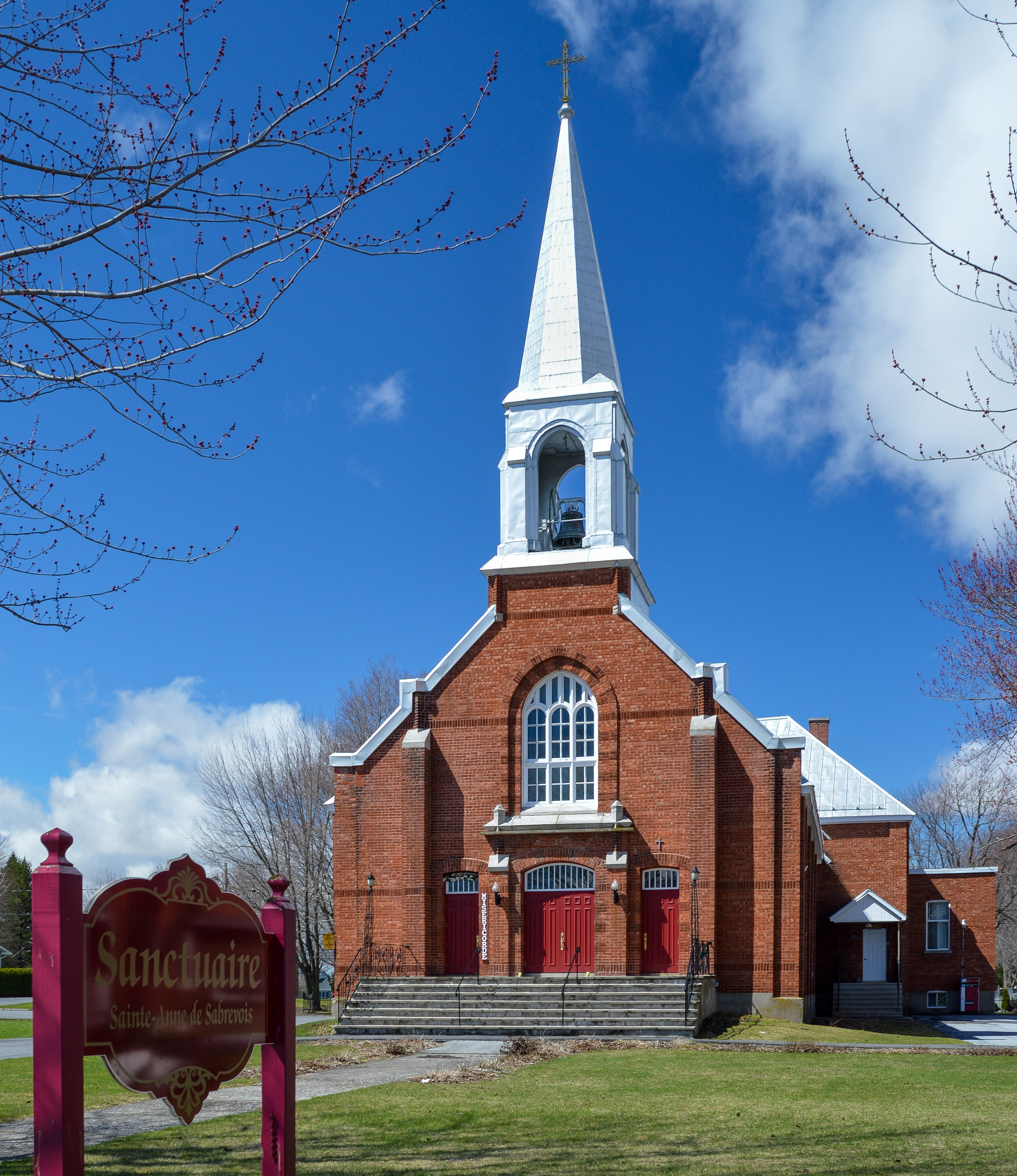 Église catholique (sanctuaire) de Sainte-Anne-de-Sabrevois, Québec, Canada